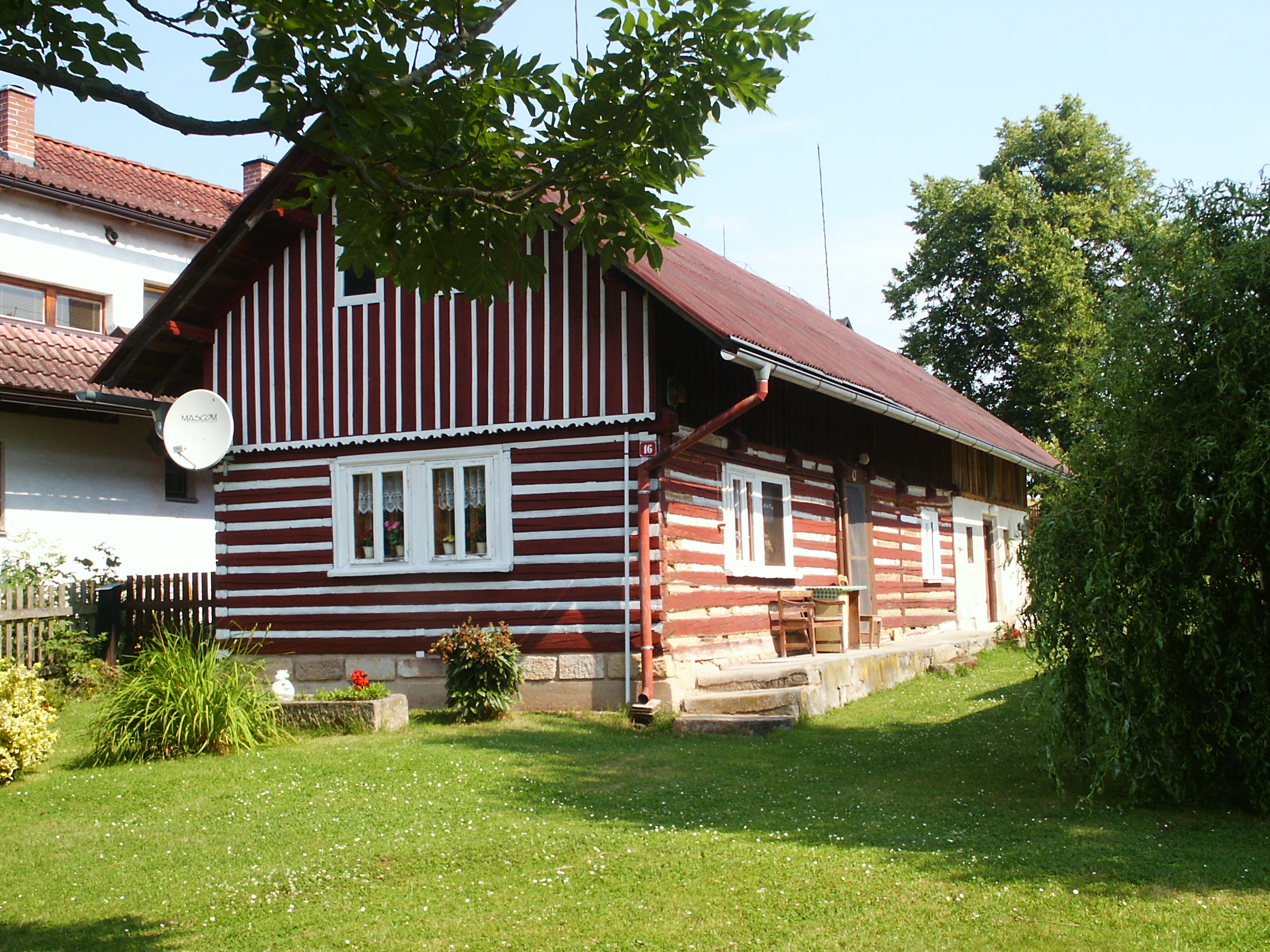 Hubojedy - č.p. 16